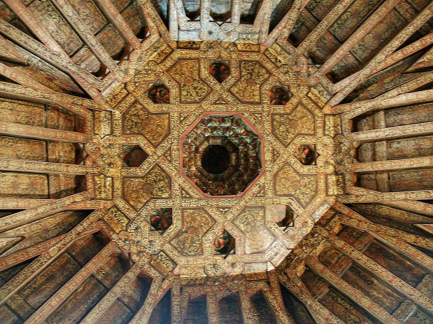 Artesonado mudéjar de la Sala de Poridad, Arco de Santa María, Burgos